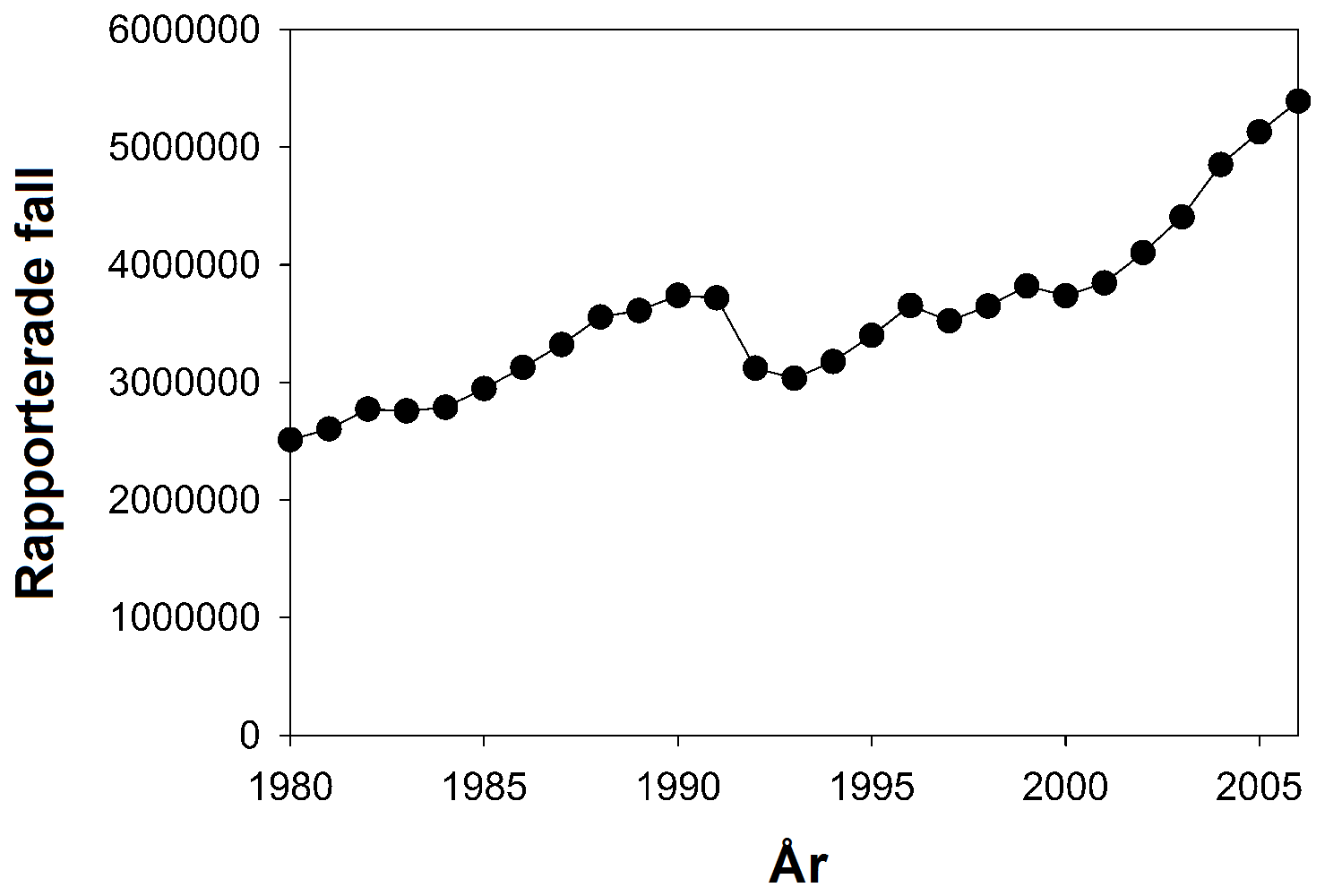 Antal rapporterade fall av tuberkulos mellan 1980-2006.